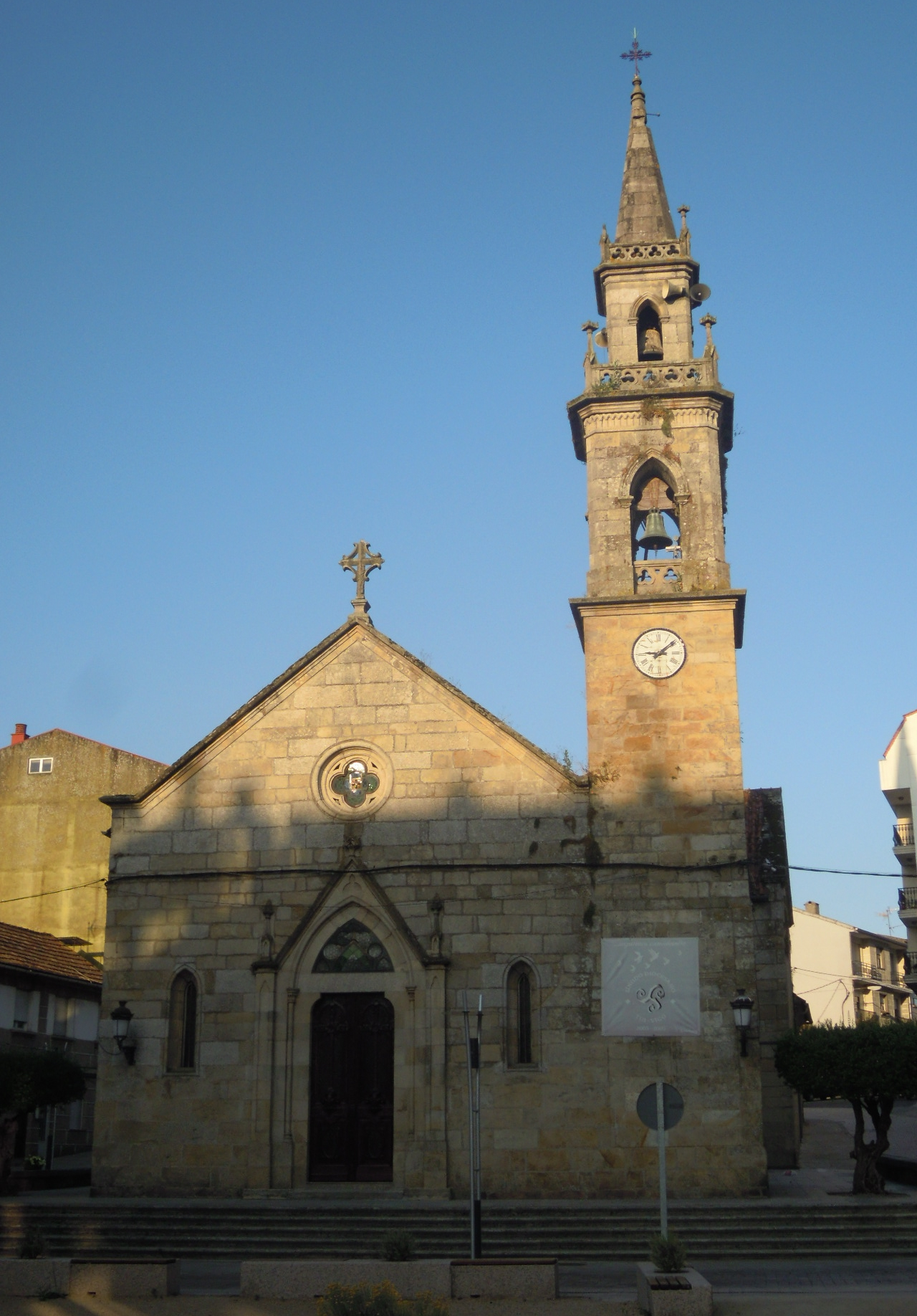 Igrexa parroquial de Santa María do Porriño, á beira da vía portuguesa do camiño de Santiago. Arquitecto Manuel Felipe Quintana Ochaíta[1].